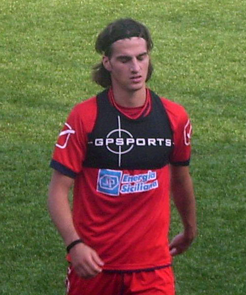 il calciatore italiano Davide Lanzafame al Calcio Catania, in allenamento al centro sportivo di Torre del Grifo Village.